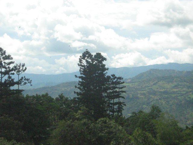 Panorama del Mesitas del Colegio en Cundinamarca Colombia